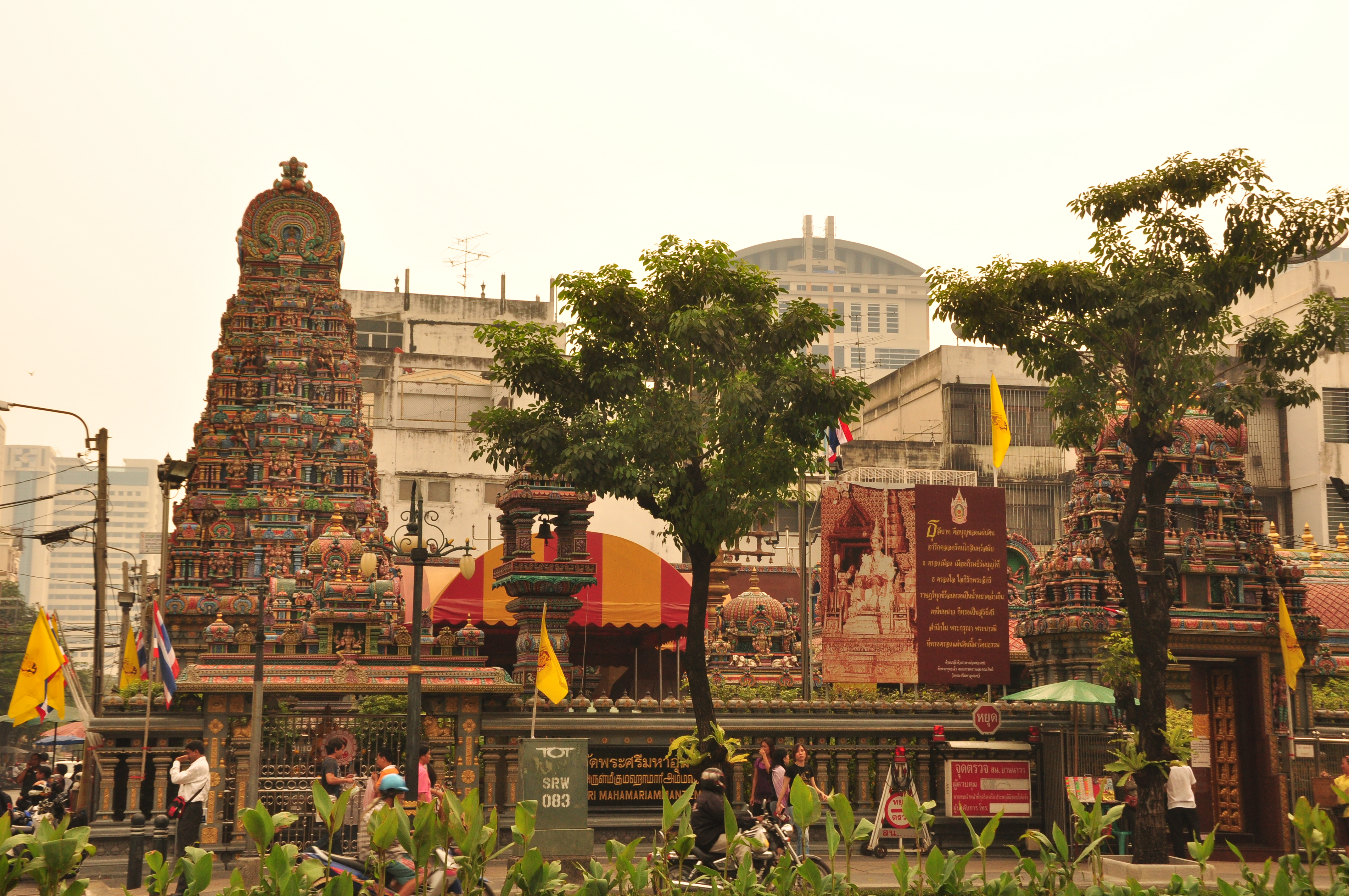 Wat Khaek Silom, 2009